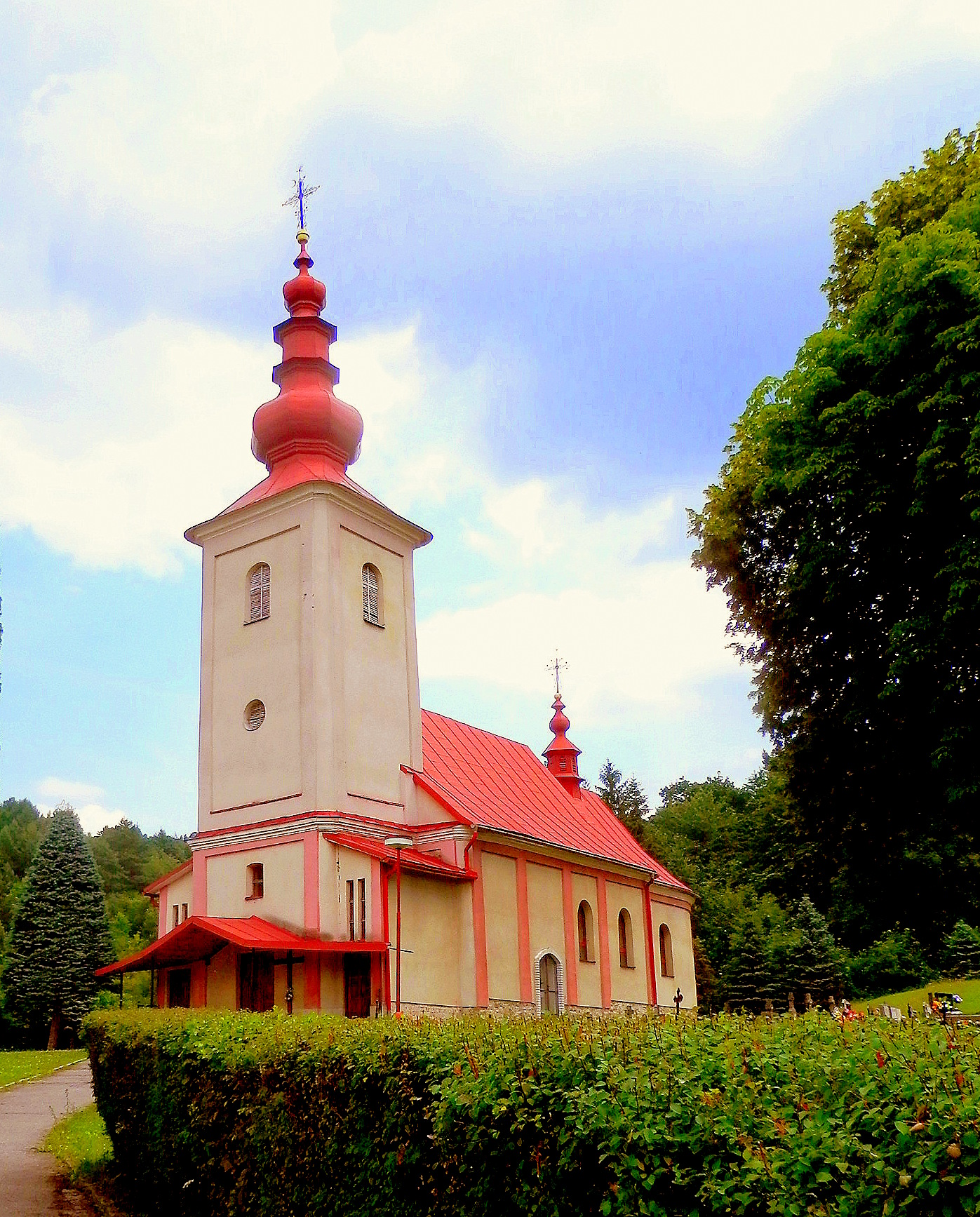 Klasicistický kostol svätého Martina. Doba vzniku 1828. Sveržov, okres Bardejov.